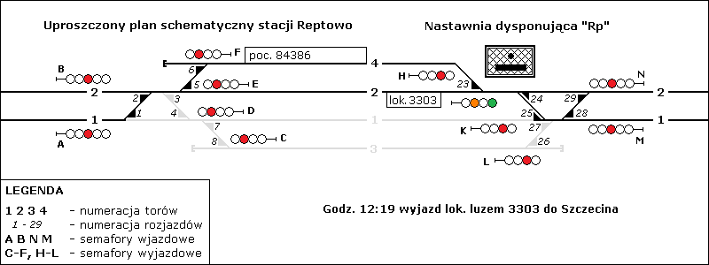 Stacja Reptowo 5 maja 1997 godz. 12:19 wyjazd lok. luzem nr 3303 do Szczecina